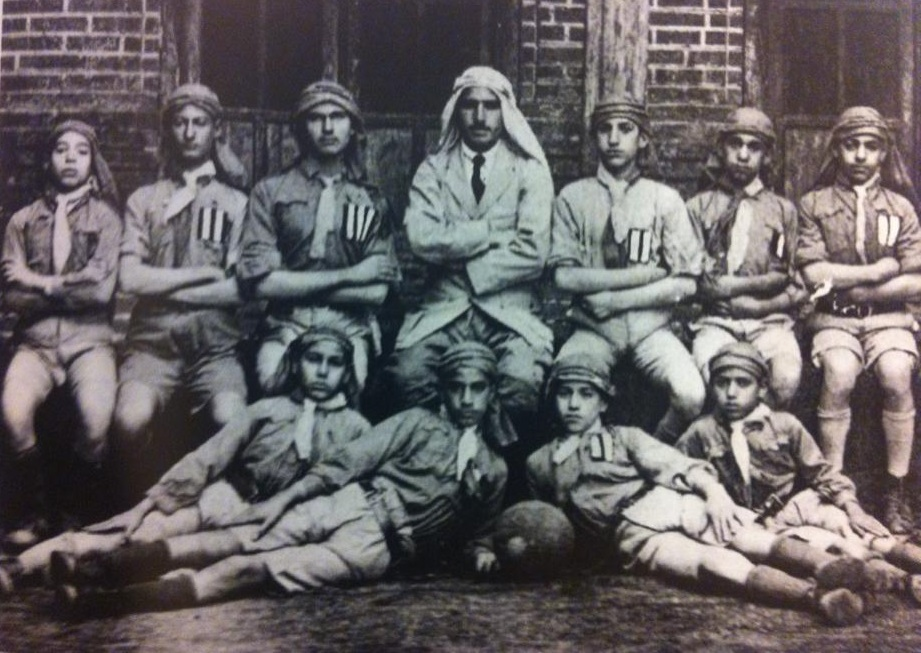 הסופר והמחנך עזרא חדד וקבוצת צופים יהודים, בגדאד, 1928. Writer and educator Ezra Haddad with a group of Jewish boyscouts in Baghdad, Iraq, 1928.